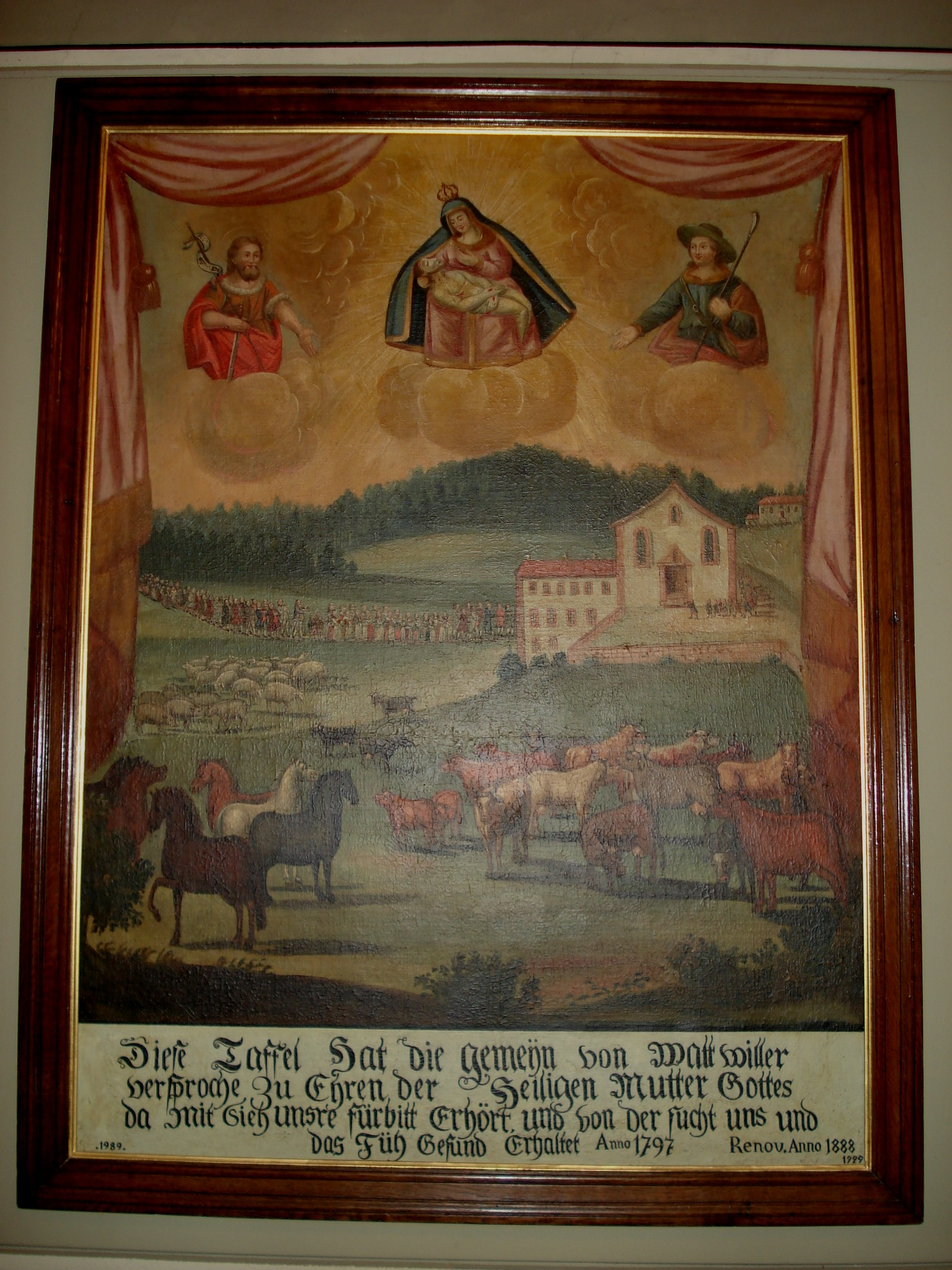 Thierenbach : tableau votif de Wattwiller datant de 1797